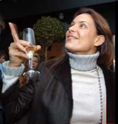 (Portuguese) A atriz brasileira Carolina Ferraz em evento de moda